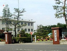 陸上自衛隊横浜駐屯地 外観